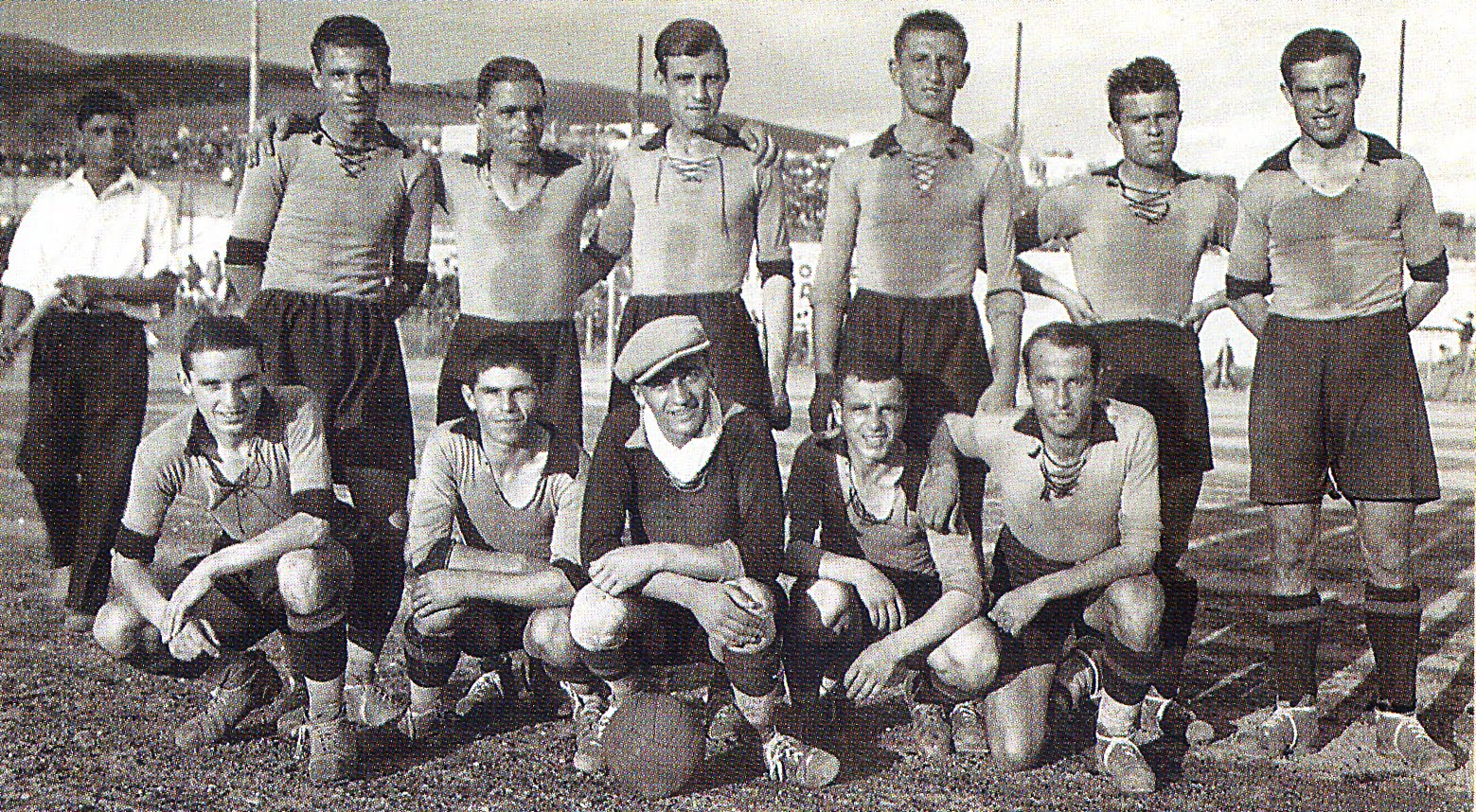 Η ποδοσφαιρική ομάδα του Άρη Θεσσαλονίκης πρωταθλήτρια Ελλάδας το 1932